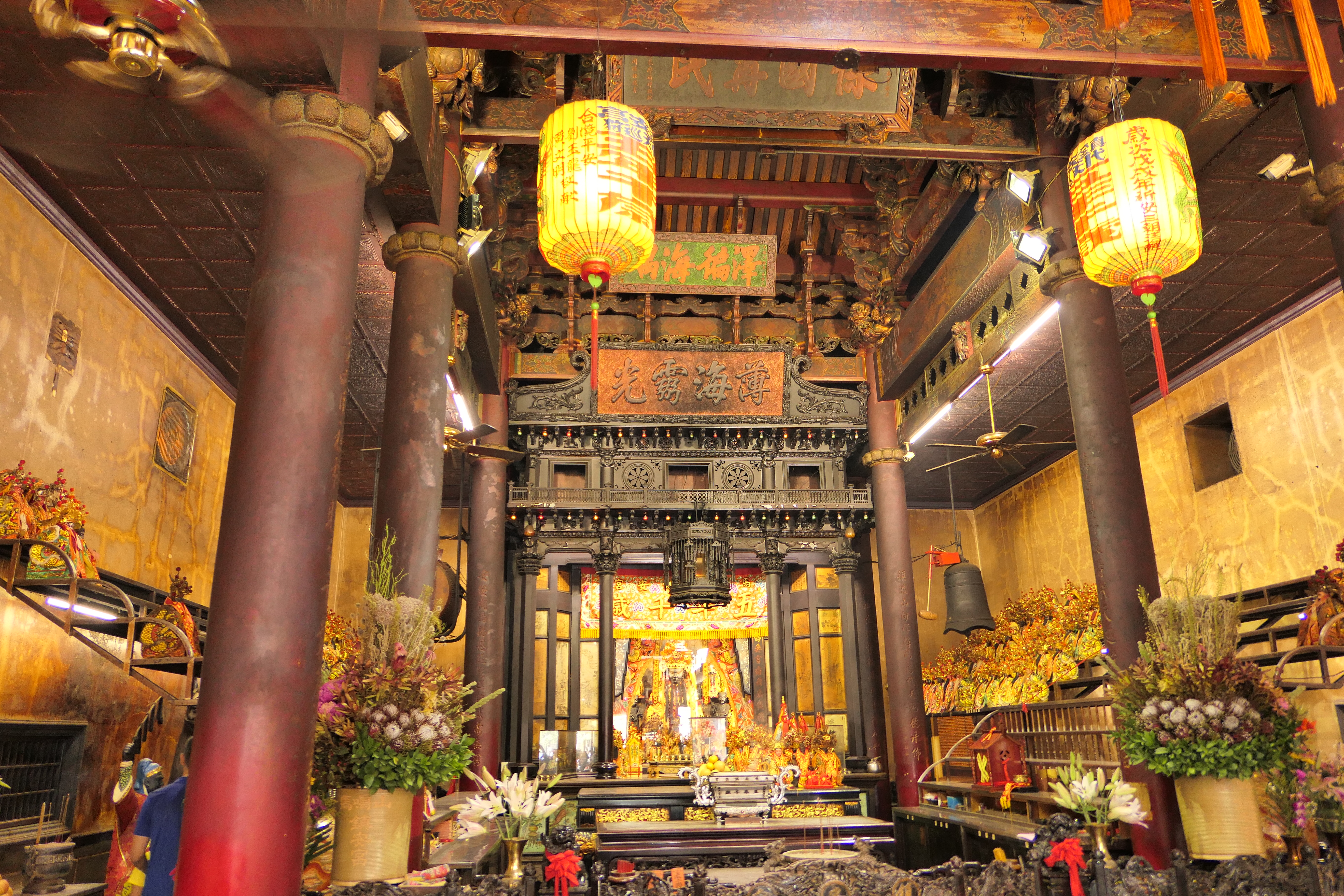 馬鳴山鎮安宮內部